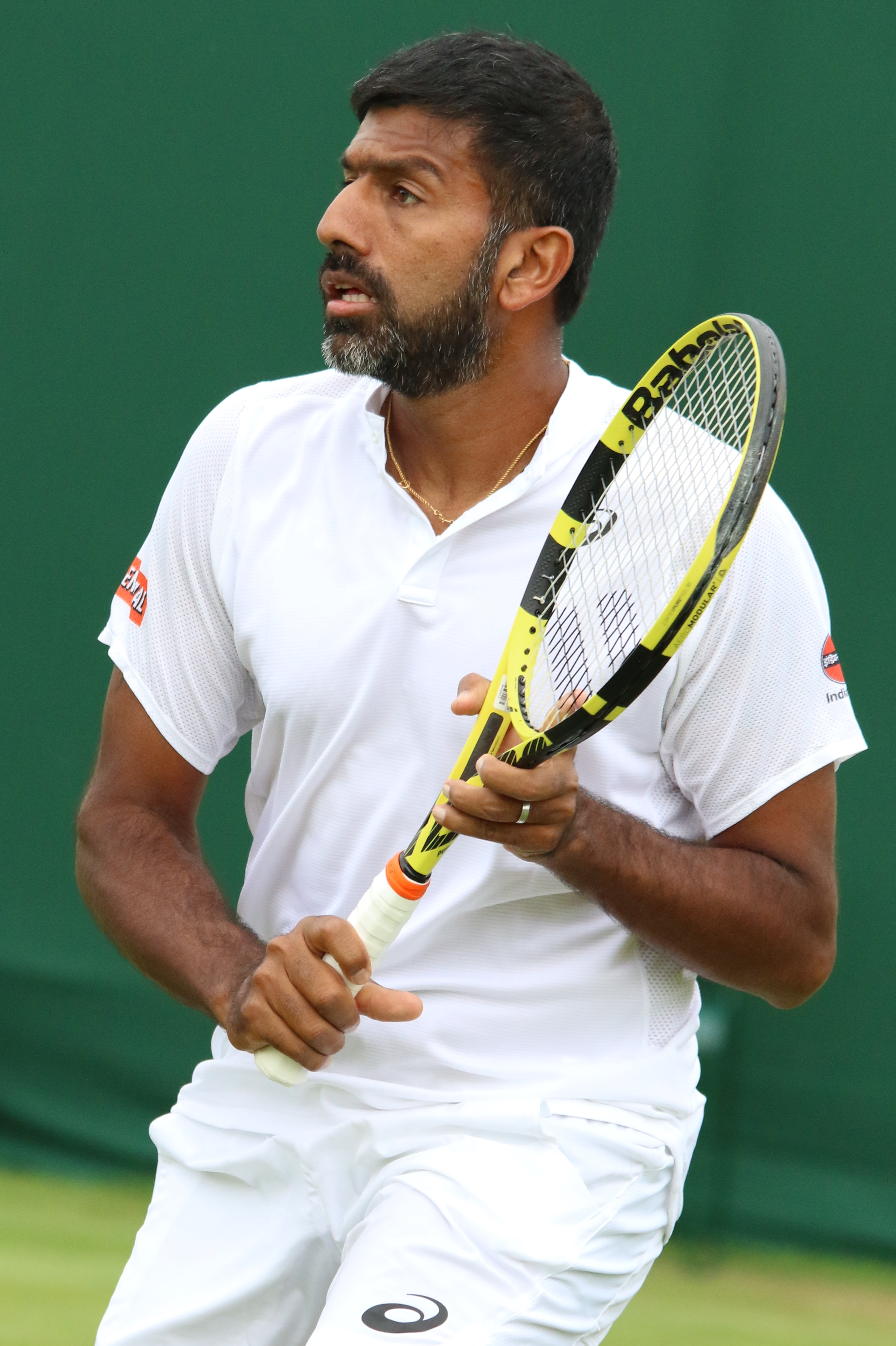 Bopanna WM19 (7)